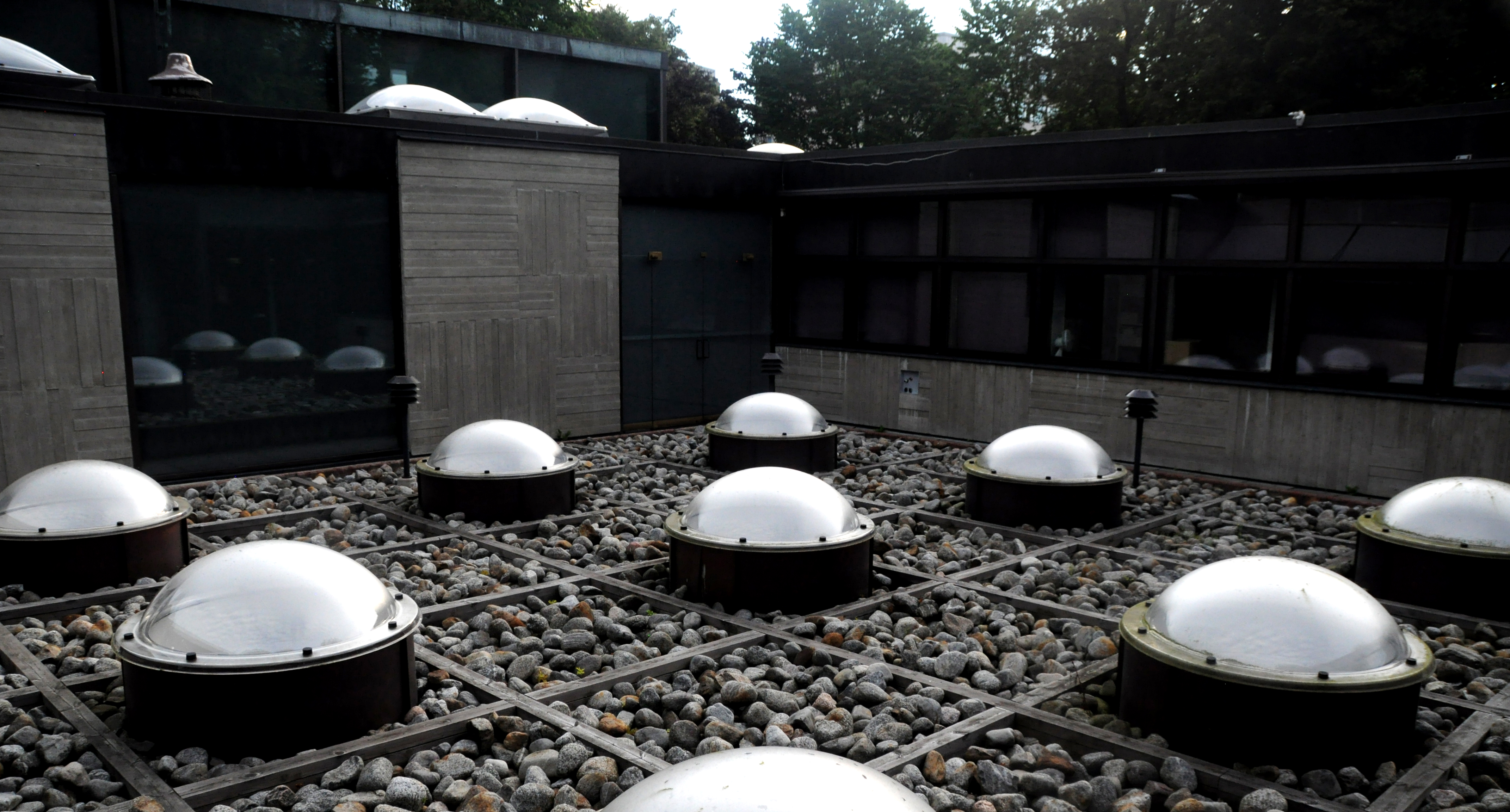 Sibelius-museon sisäpiha